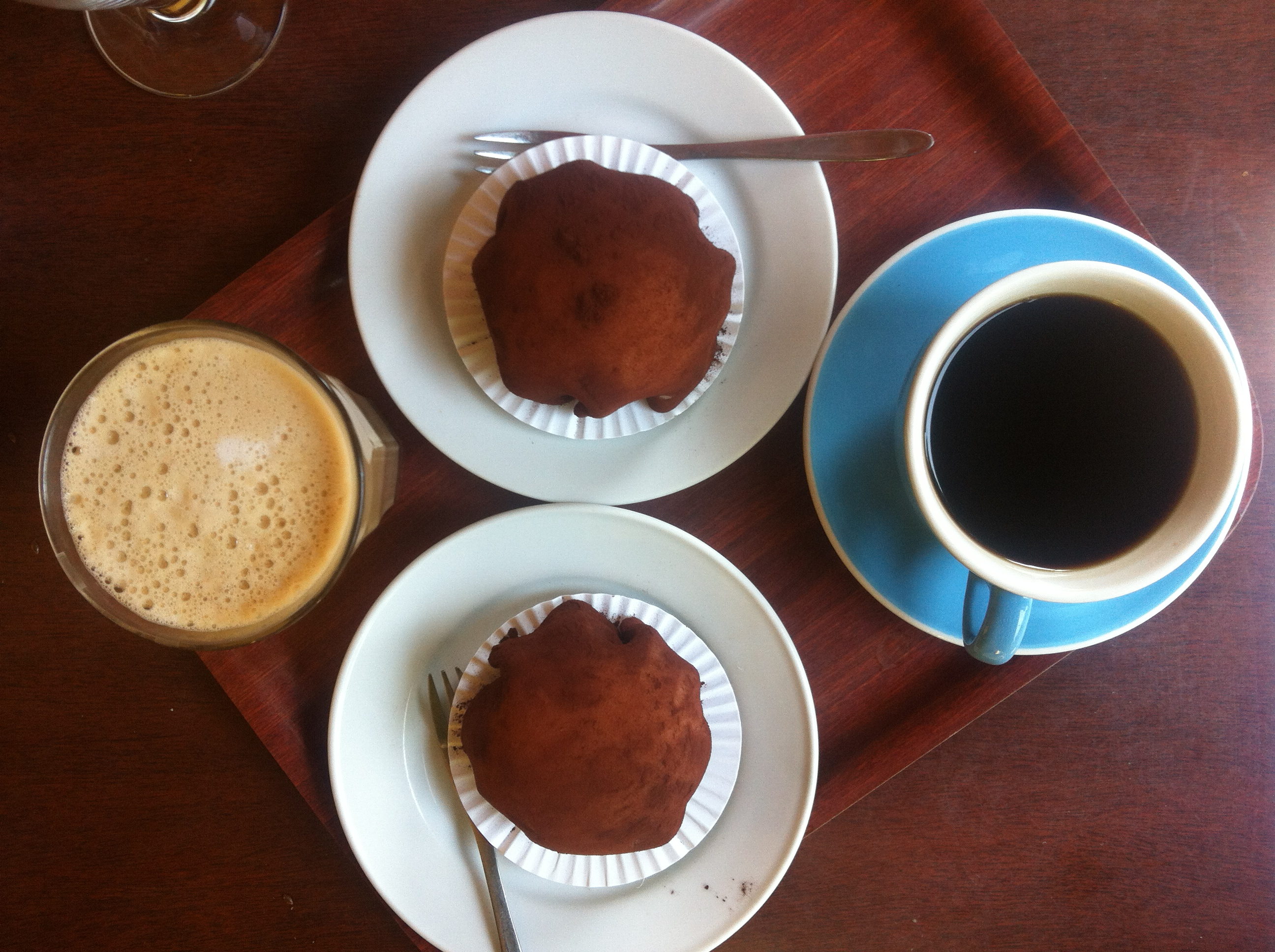 Kartoffelkager og kaffe